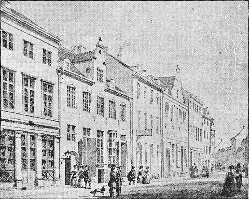 Kong Salomons Apotek og Efterslægtens skole på Østergade. 1840.